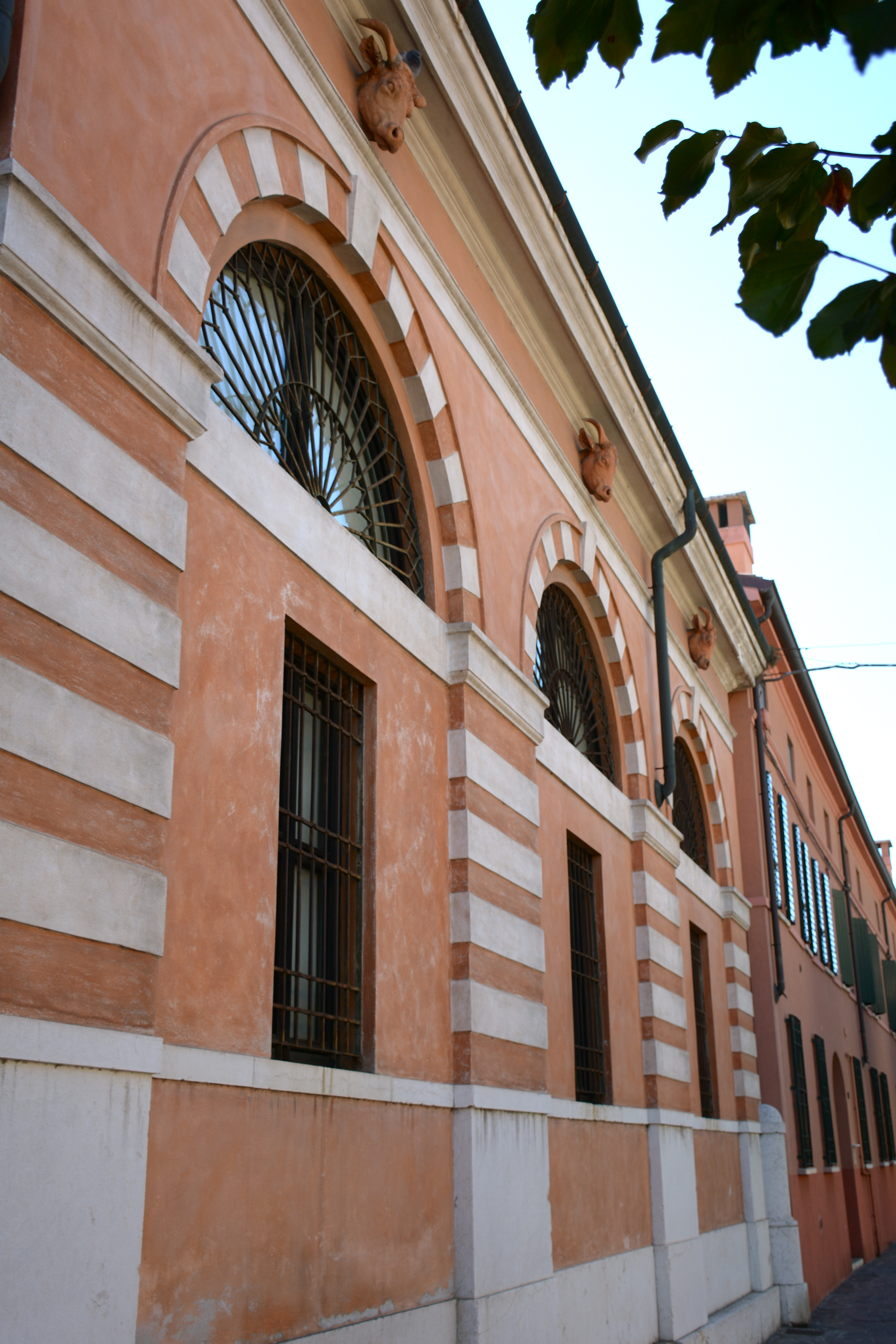 Centro culturale Gino Baratta (esterni, cortile) This is a photo of a monument which is part of cultural heritage of Italy.